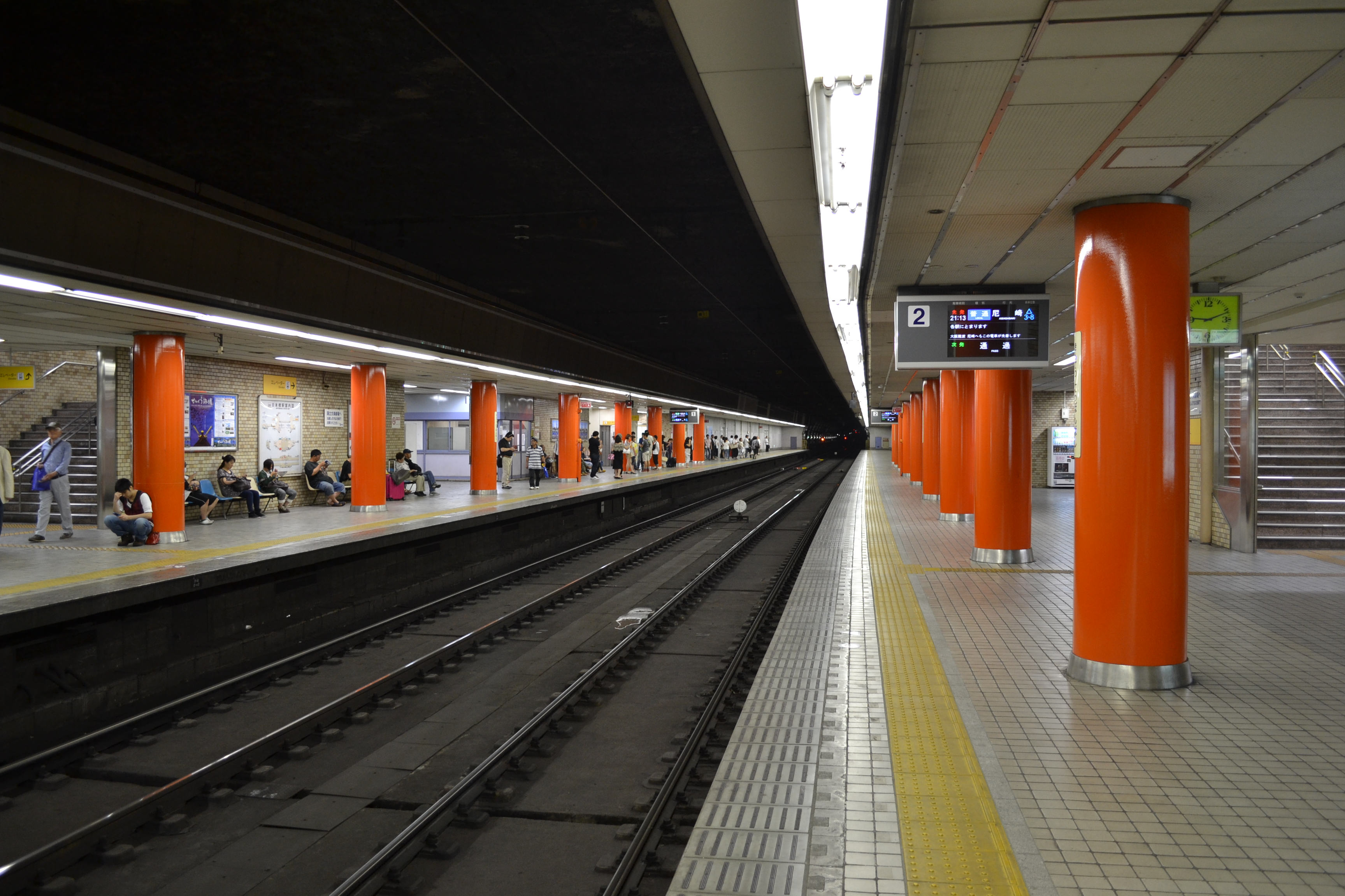 近鉄日本橋駅プラットホーム